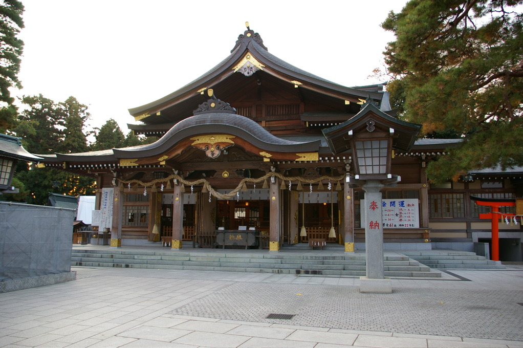 Takekoma Shrine